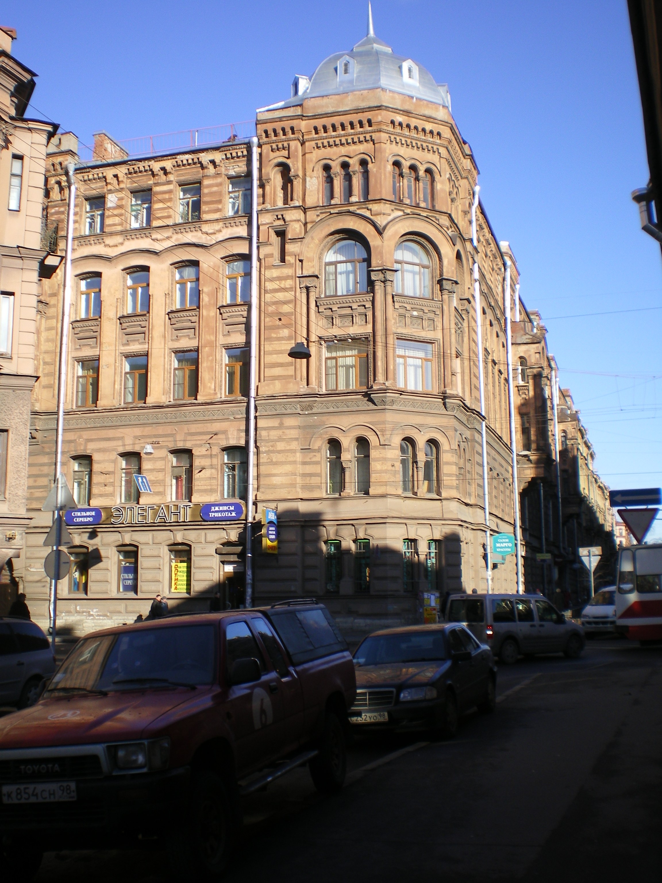 Дом с башней на углу Пушкинской и Кузнечного